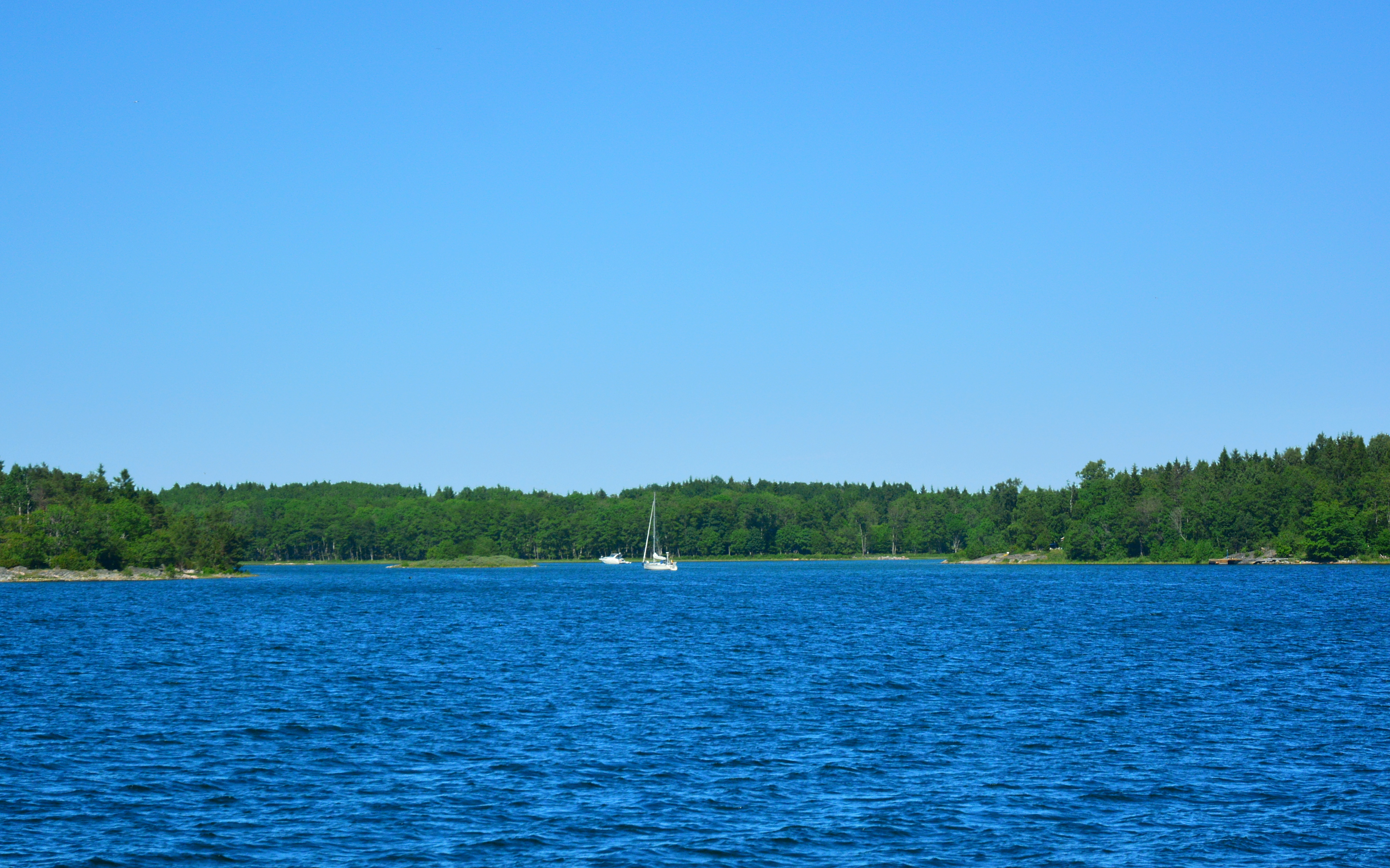 Idöfladen är en populär naturhamn på västra sidan av Idö i Stockholms norra skärgård.